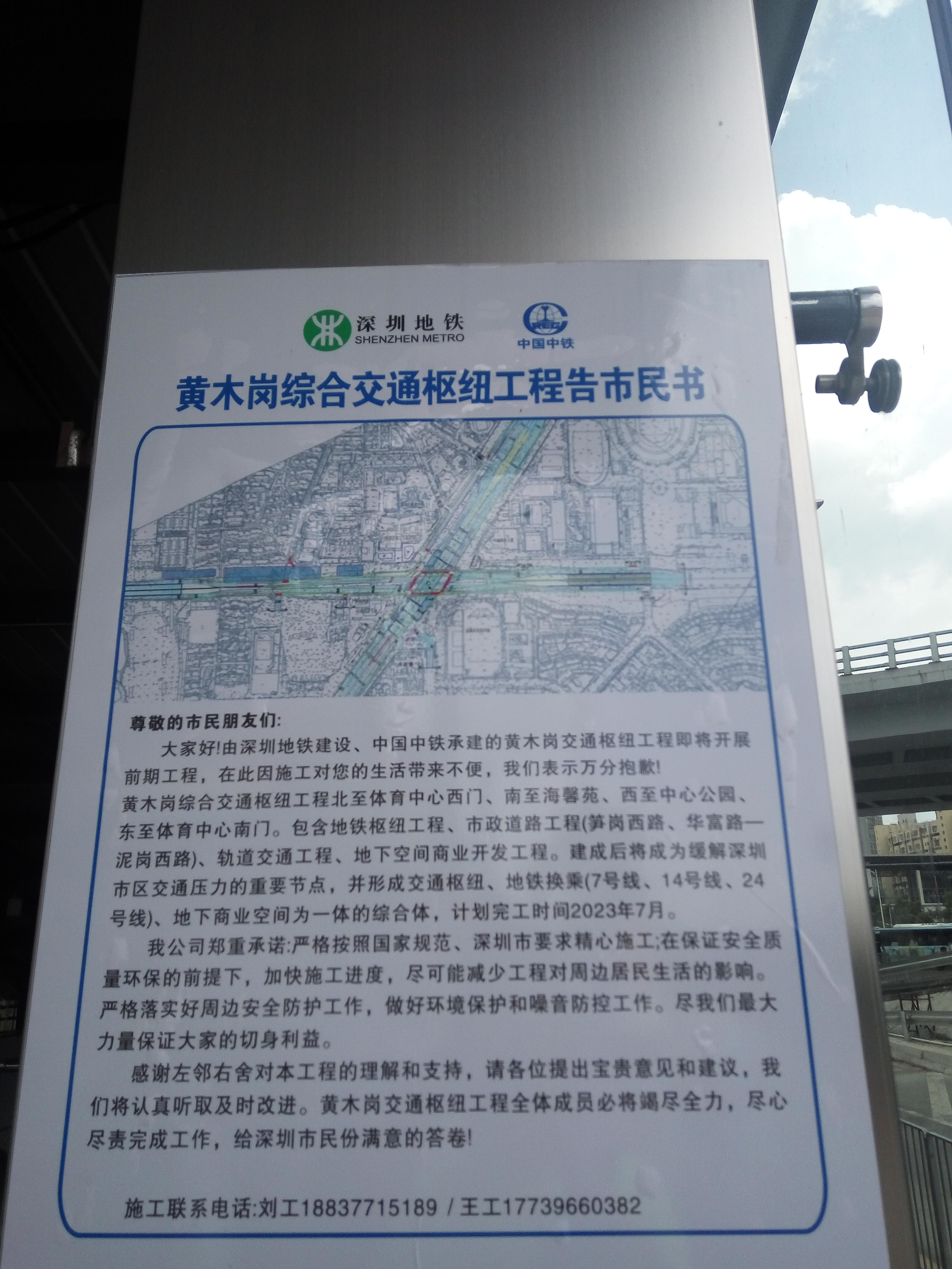 黄木岗交通枢纽工程公告